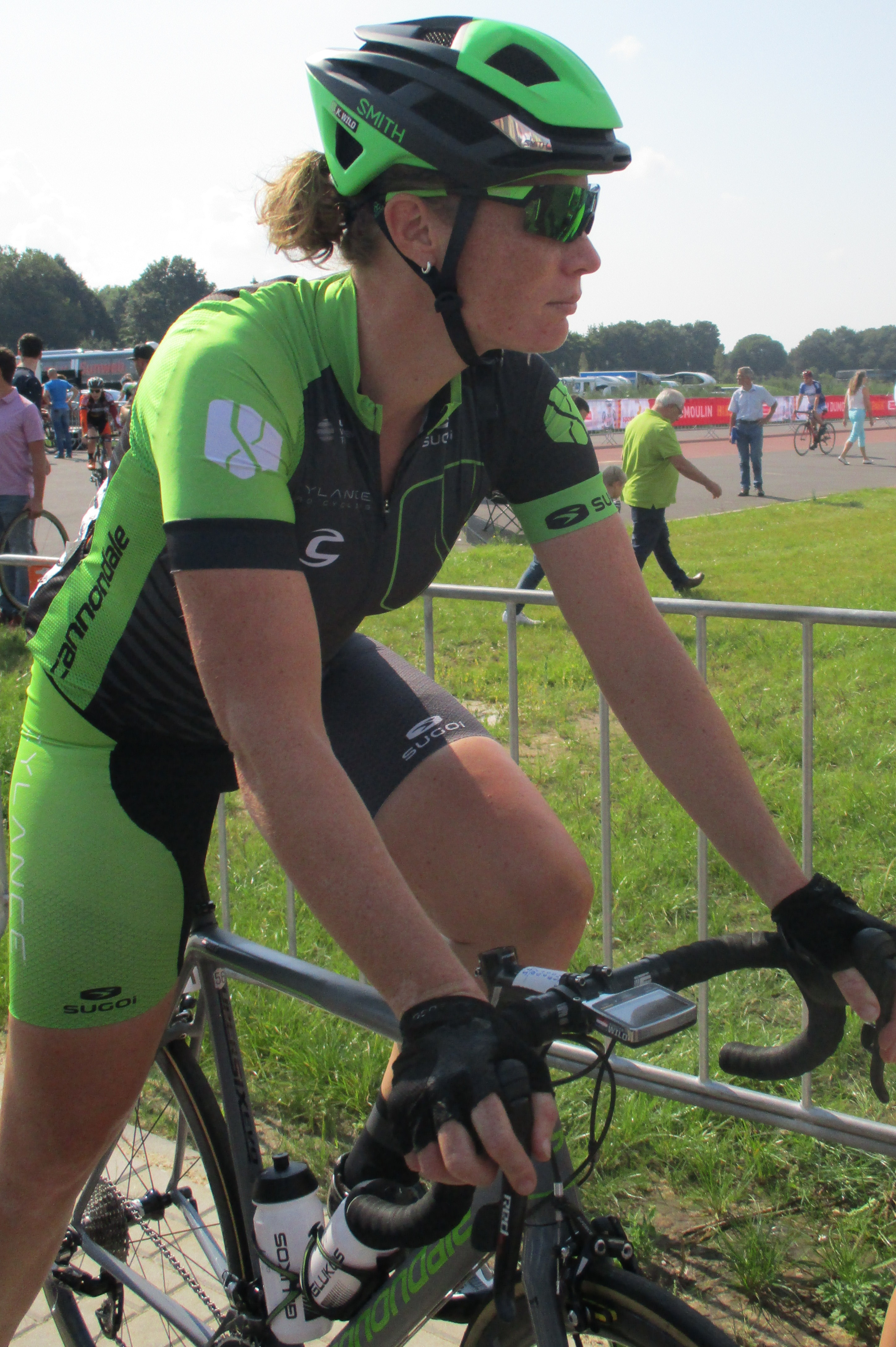 Start van de 6e etappe van de Boels Ladies Tour 2017 op het Tom Dumoulin Bike Park in Sittard-Geleen.